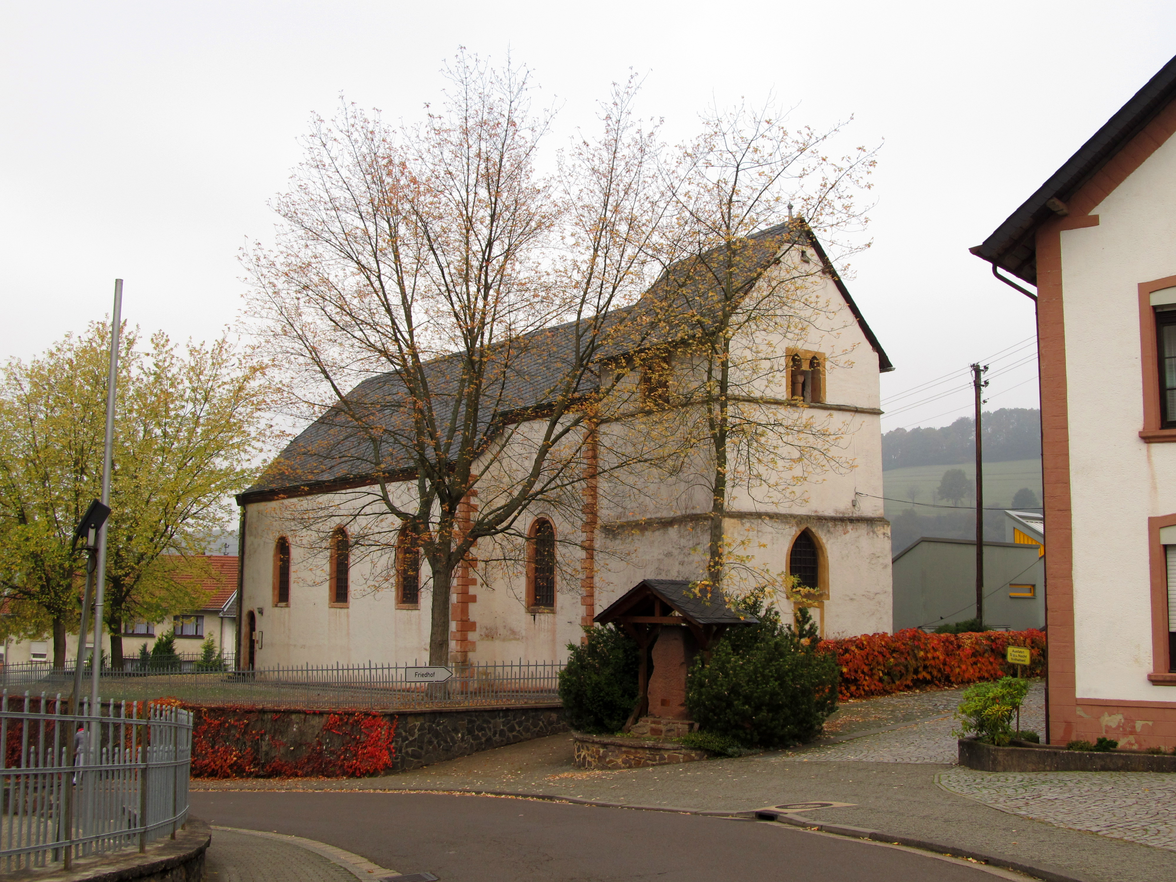 Die "Alte Kirche" in Limbach, einem Ortsteil der Gemeinde Schmelz, Landkreis Saarlouis, Saarland